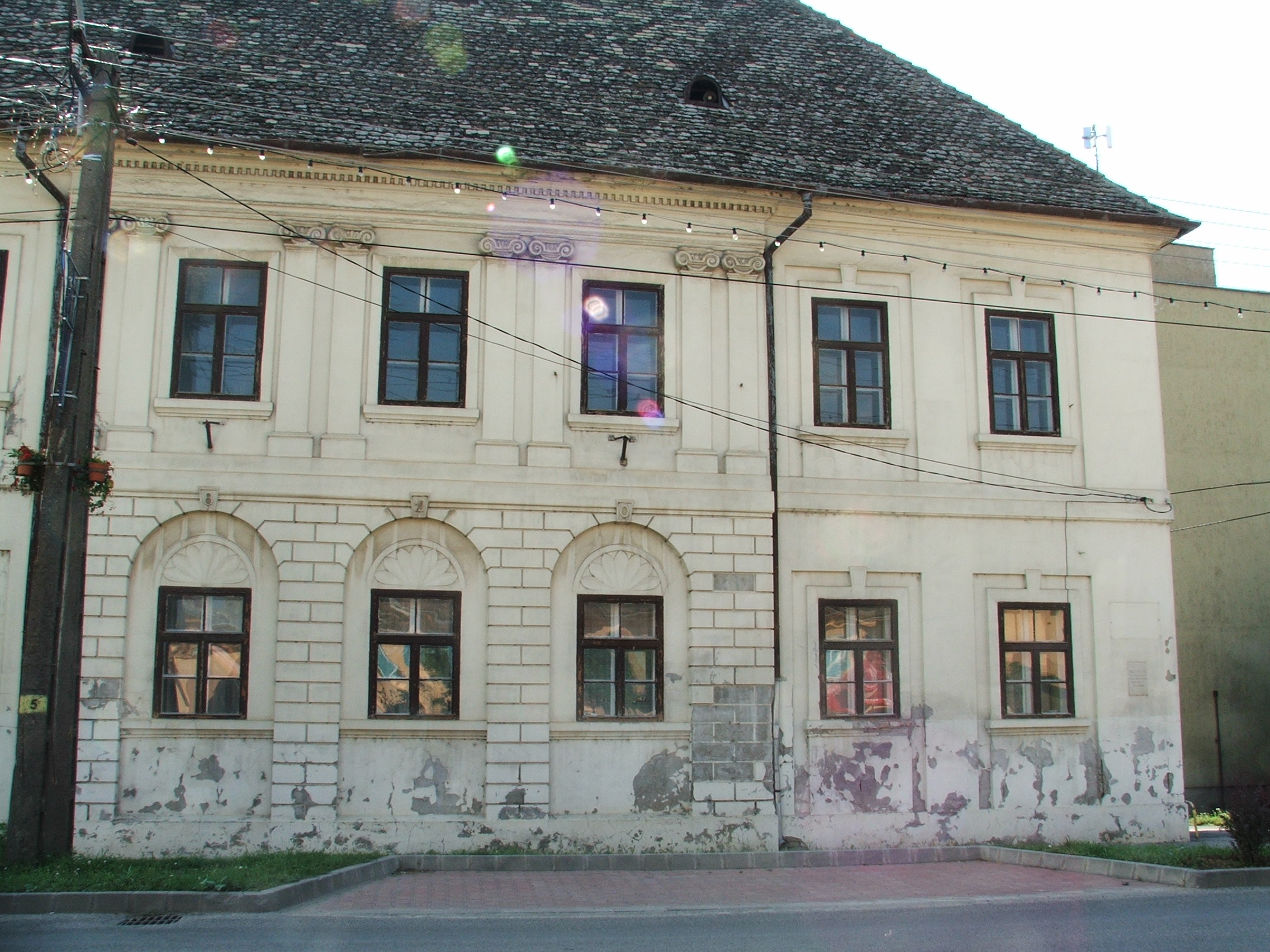 Uradalmi épület (lakóház). - Műemléki azonosító: 8547 (törzsszám 4195). Nyílászárók (eredetiek?): 19. század. Építtette a Collegium Theresianum az alapítványi uradalom számvevőségének központjaként. -Tolna m., Bátaszék, Budai út 7.